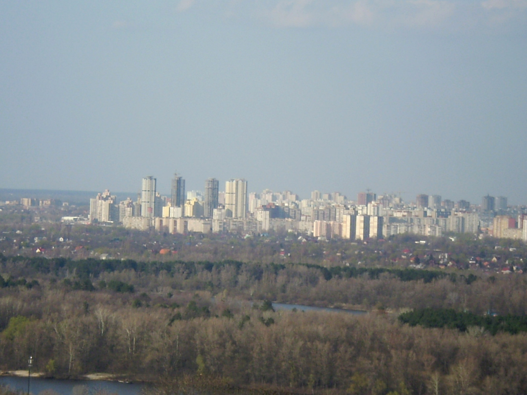 панорама на житл. масив Троєщина з правого берегу Дніпра